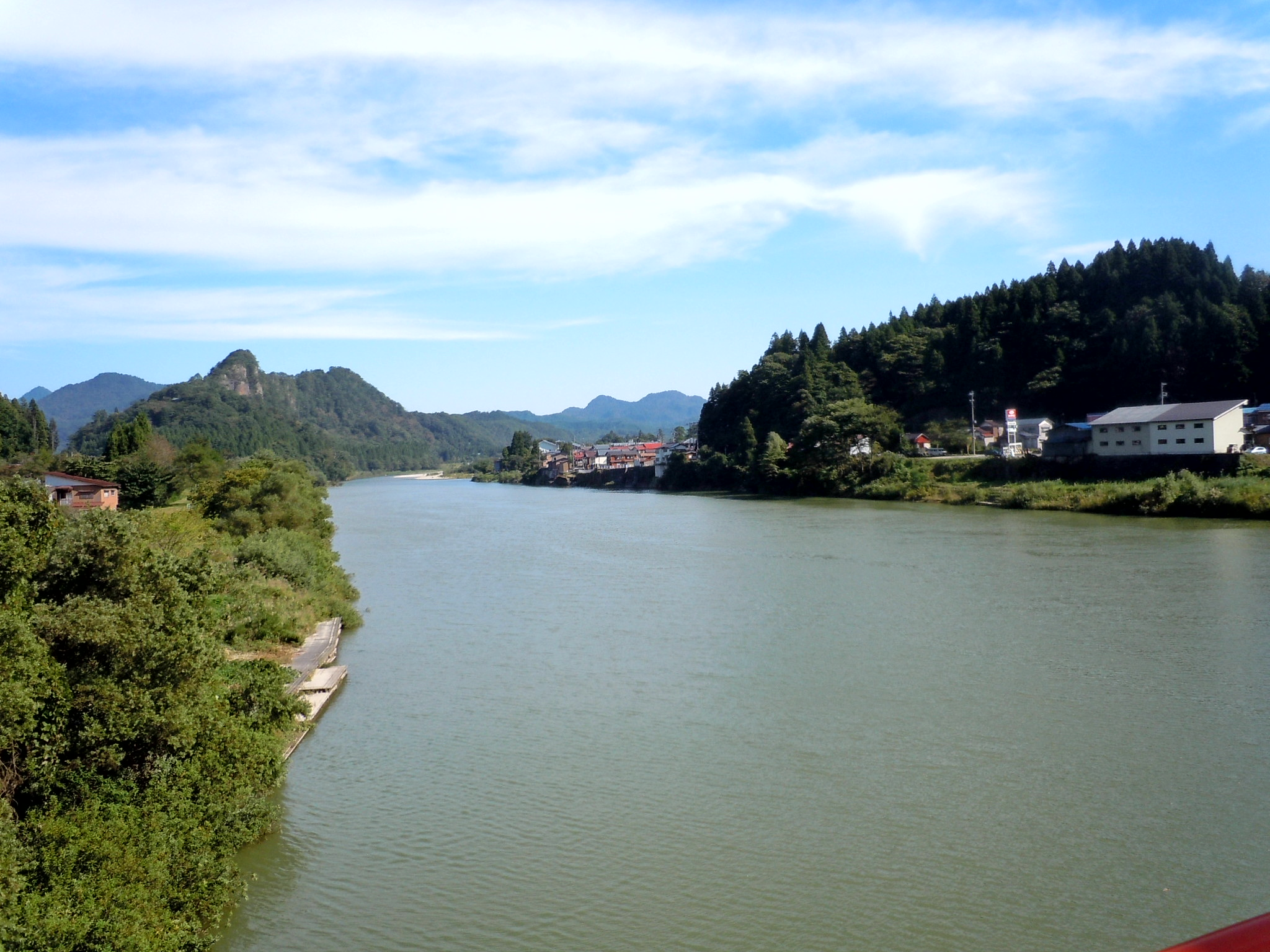 きりん橋から見た阿賀野川（新潟県阿賀町）